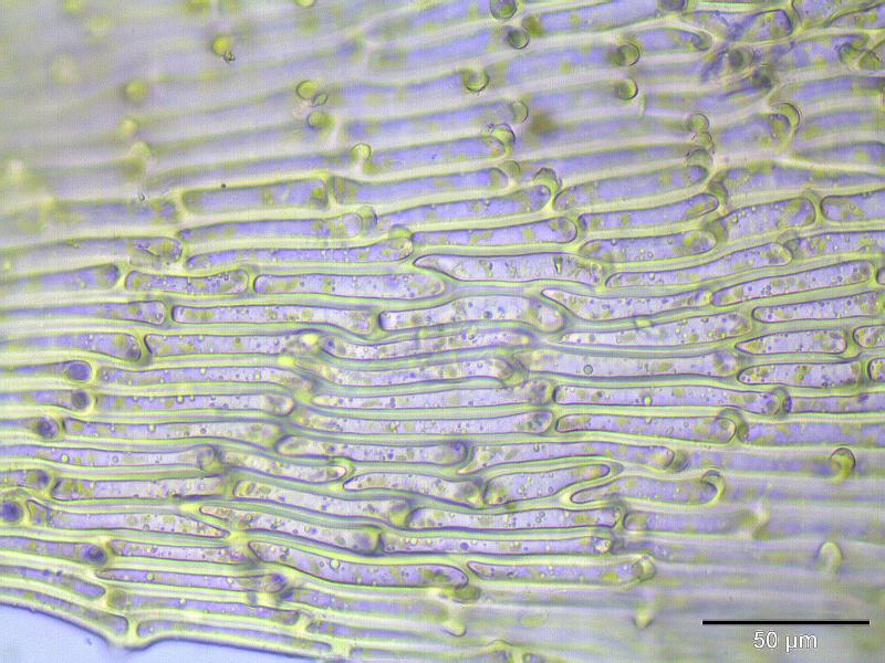 Gemeines Quellmoos (Philonotis fontana), Laminazellen, ~400x vergrößert